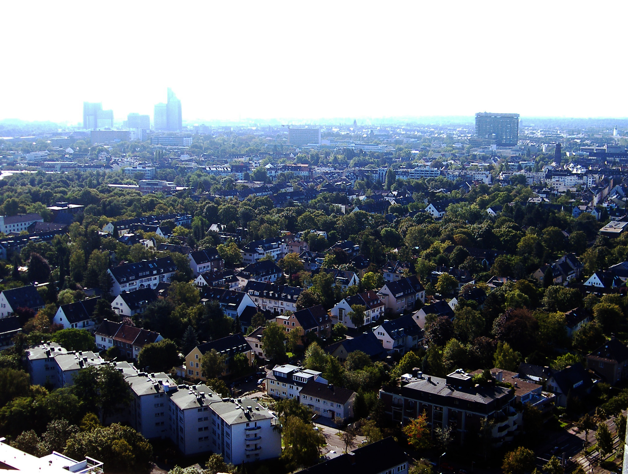 Lindenthal